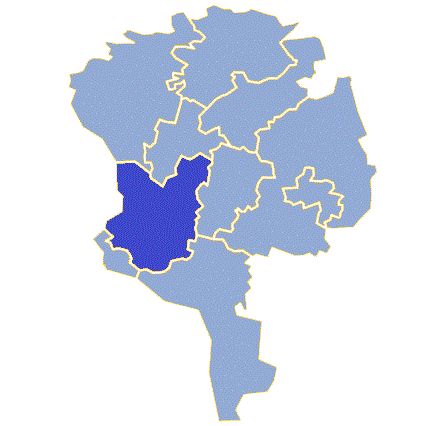 Powiat żarski - Gmina Trzebiel